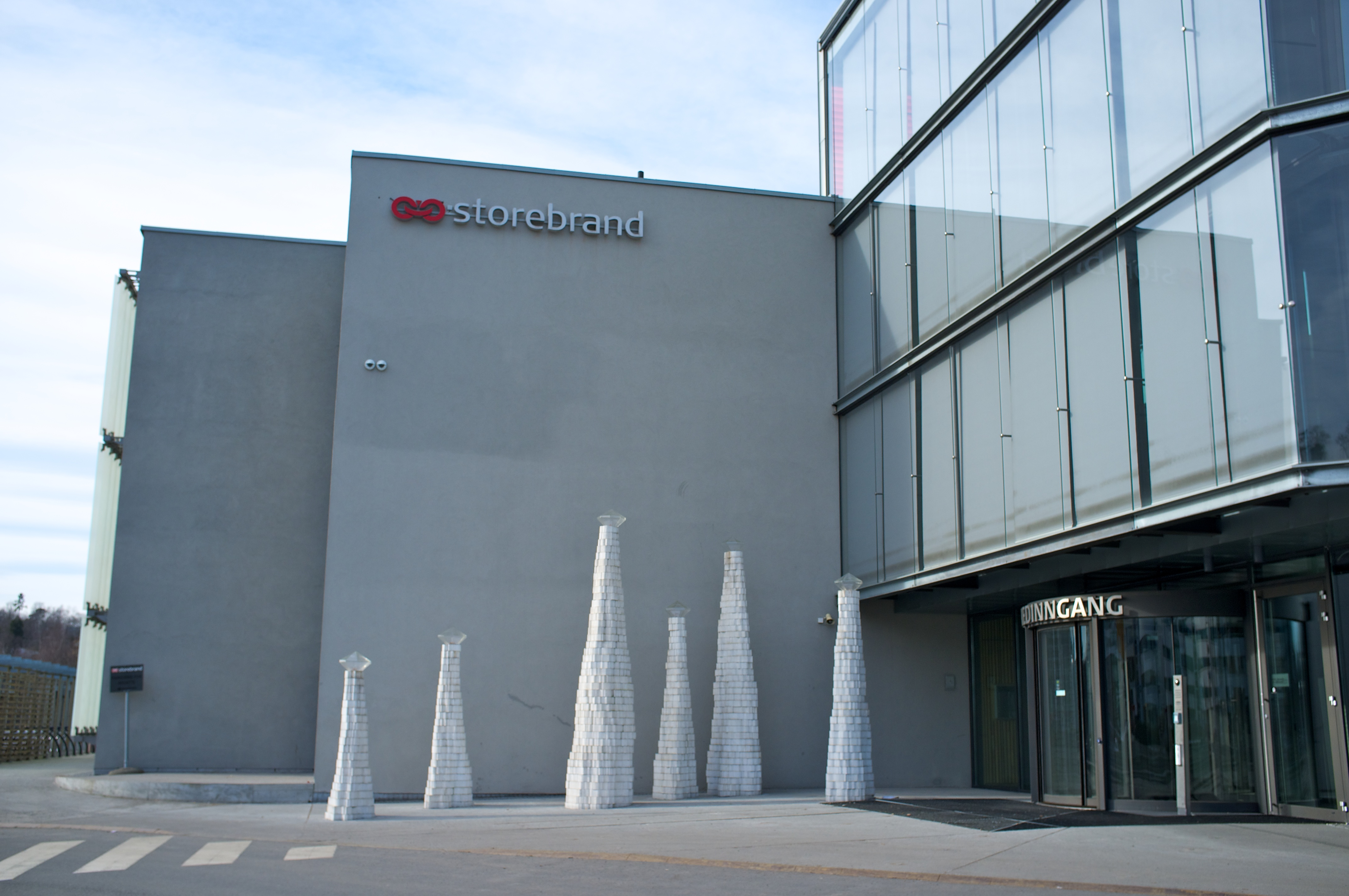 Professor Kohts vei 9, Lysaker